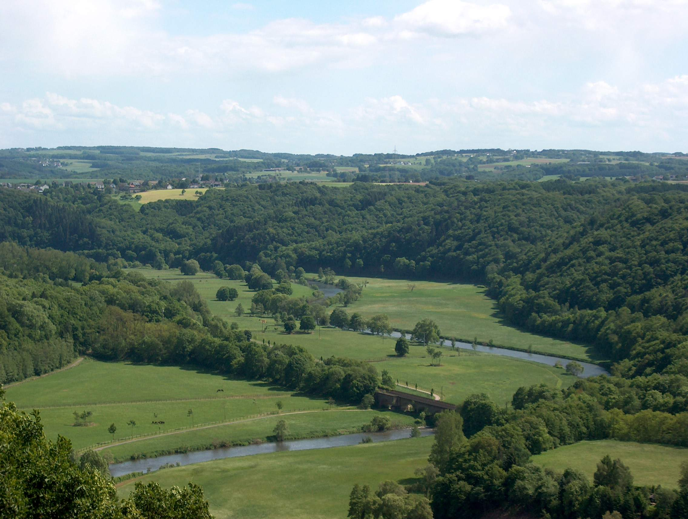 Siegtal/-schleife zwischen Eitorf-Merten und Hennef-Bülgenauel